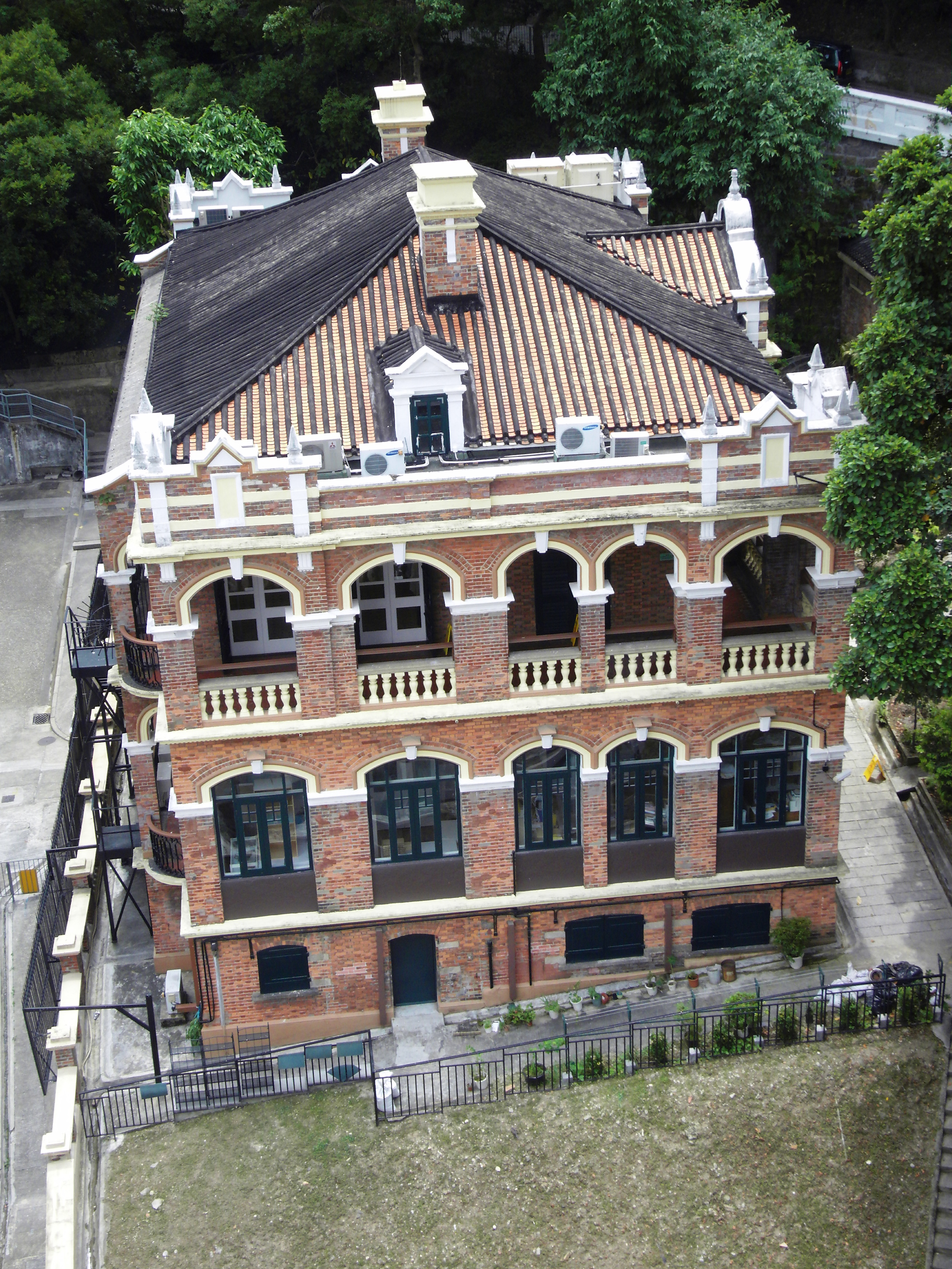 中文（香港）: 香港醫學博物館屋頂蓋上中式簷瓦